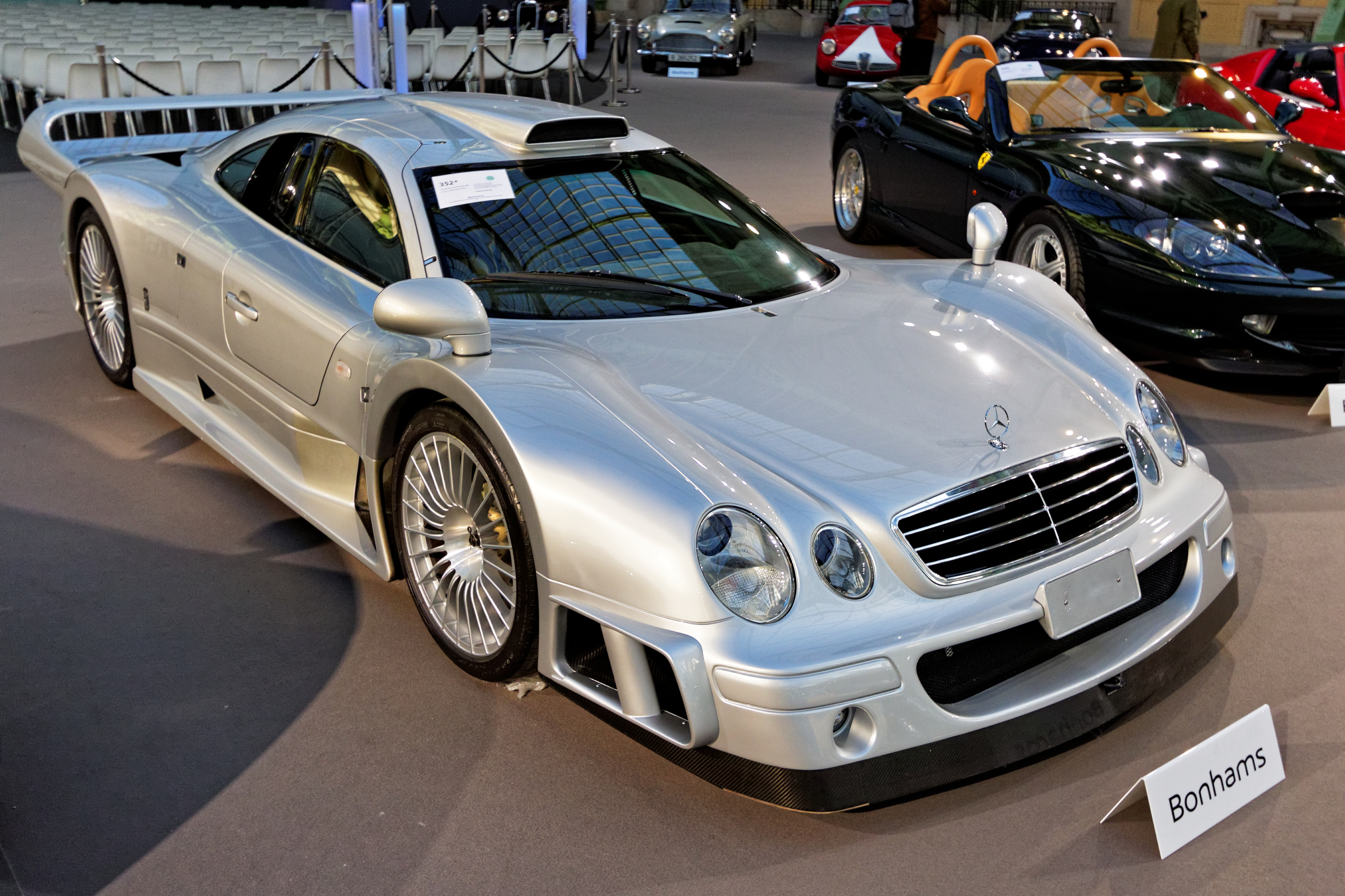 Un des véhicules présenté lors de la vente aux enchères Bonhams 2016 au Grand Palais de Paris.